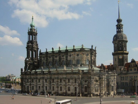 Hofkirche te Dresden. Eigen foto, augustus 2004